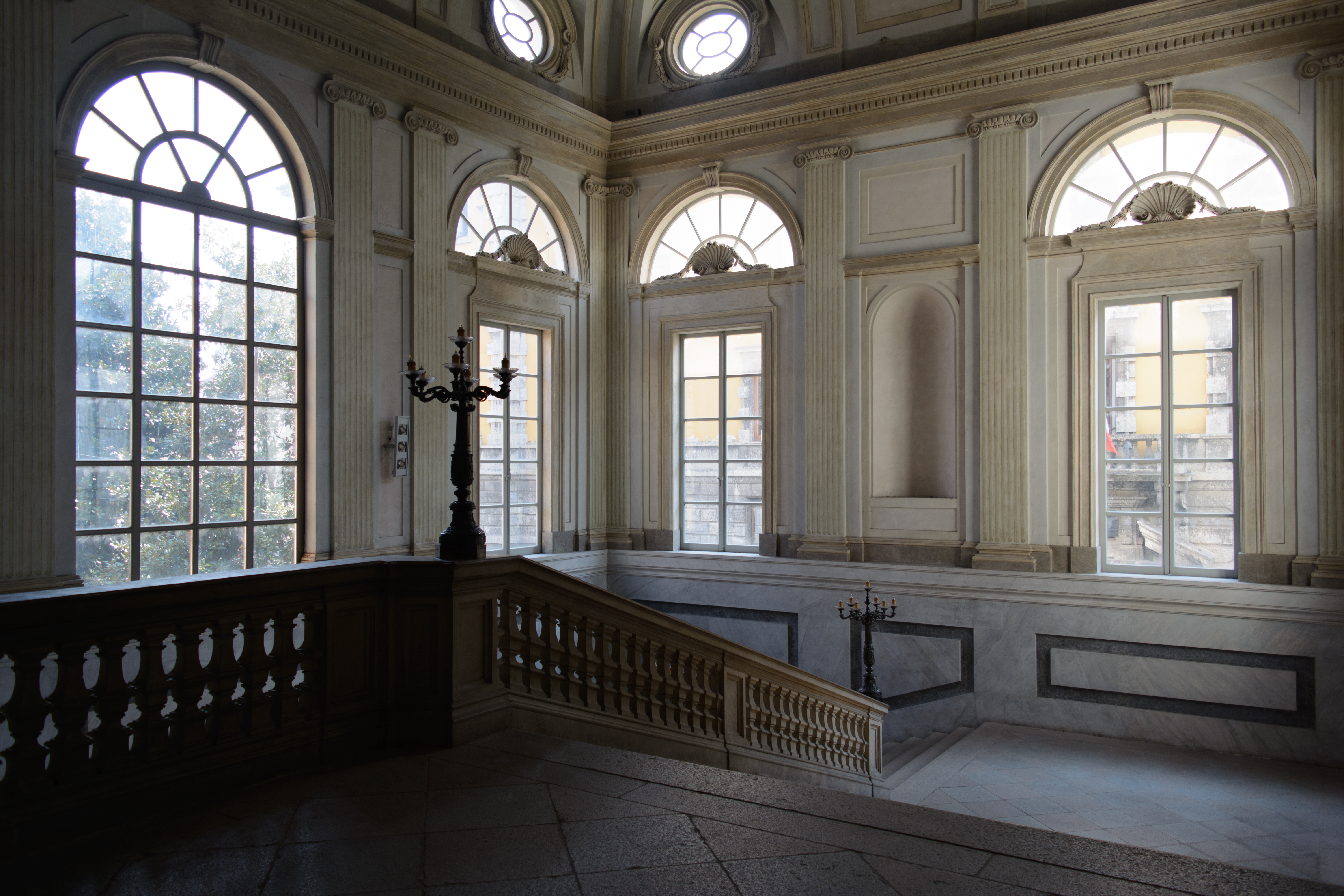 Palazzo Reale di Milano This is a photo of a monument which is part of cultural heritage of Italy.